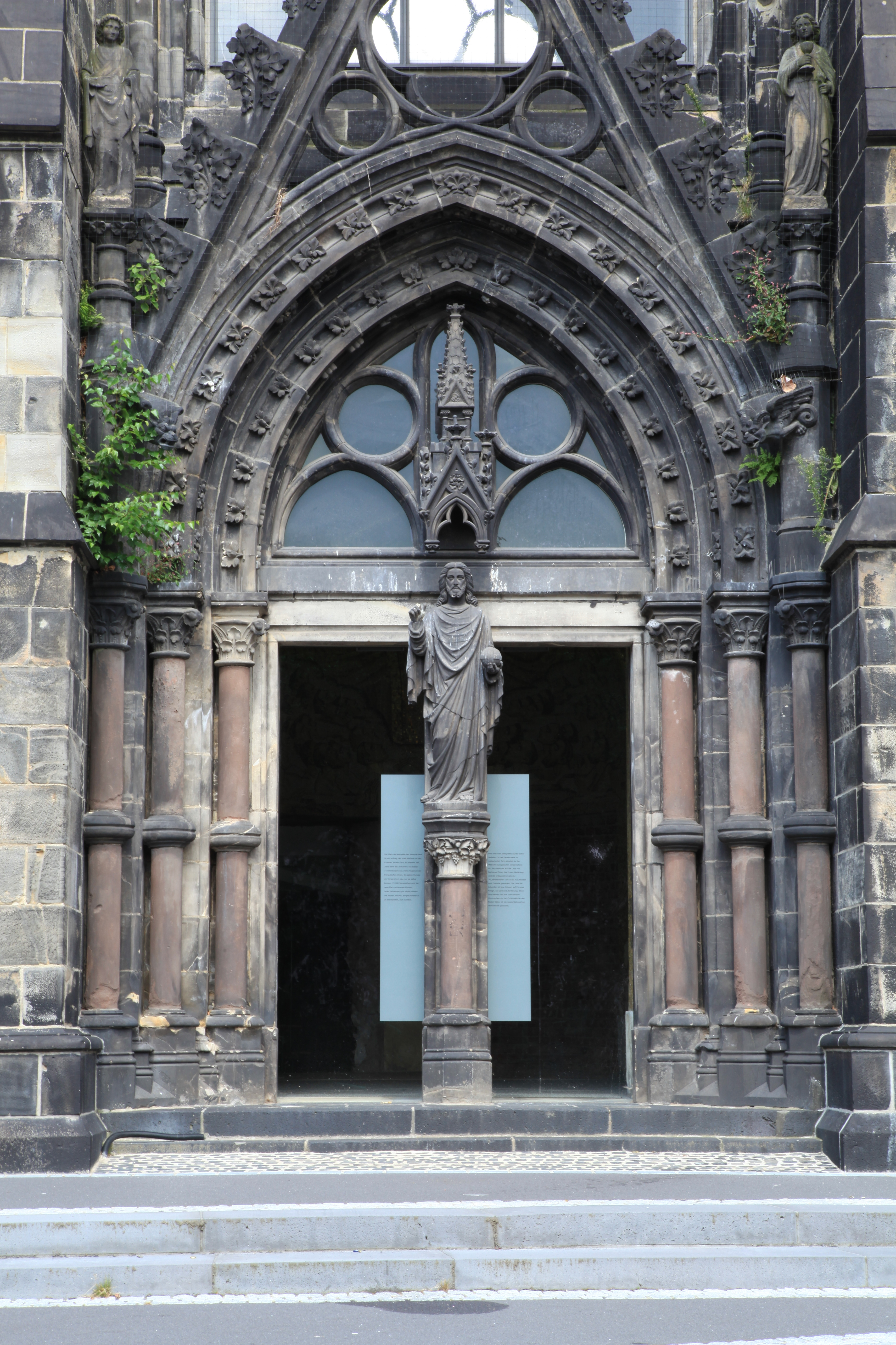 Christuskirche, Westring 26A in Bochum